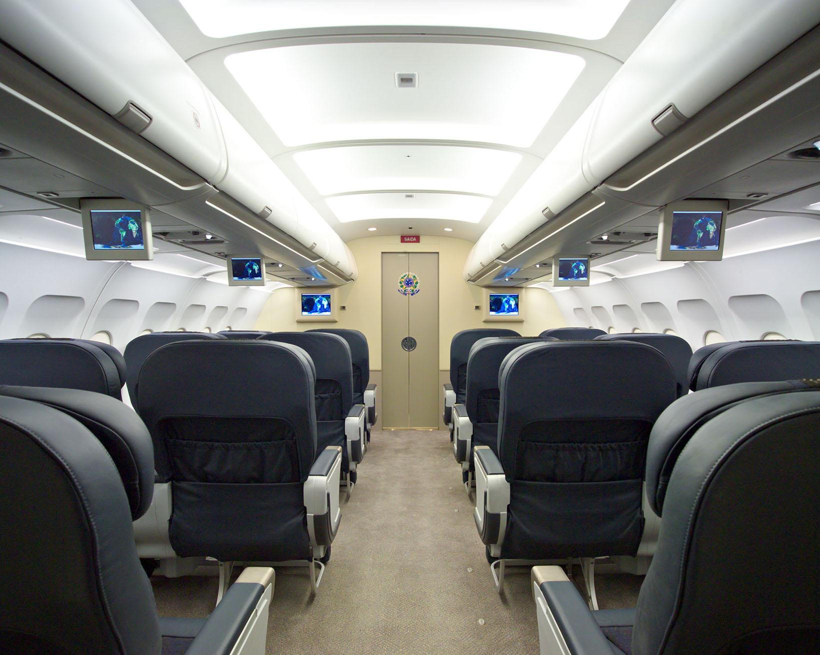 A Aeronave presidencial (FAB 001; Aerolula) brasileira.